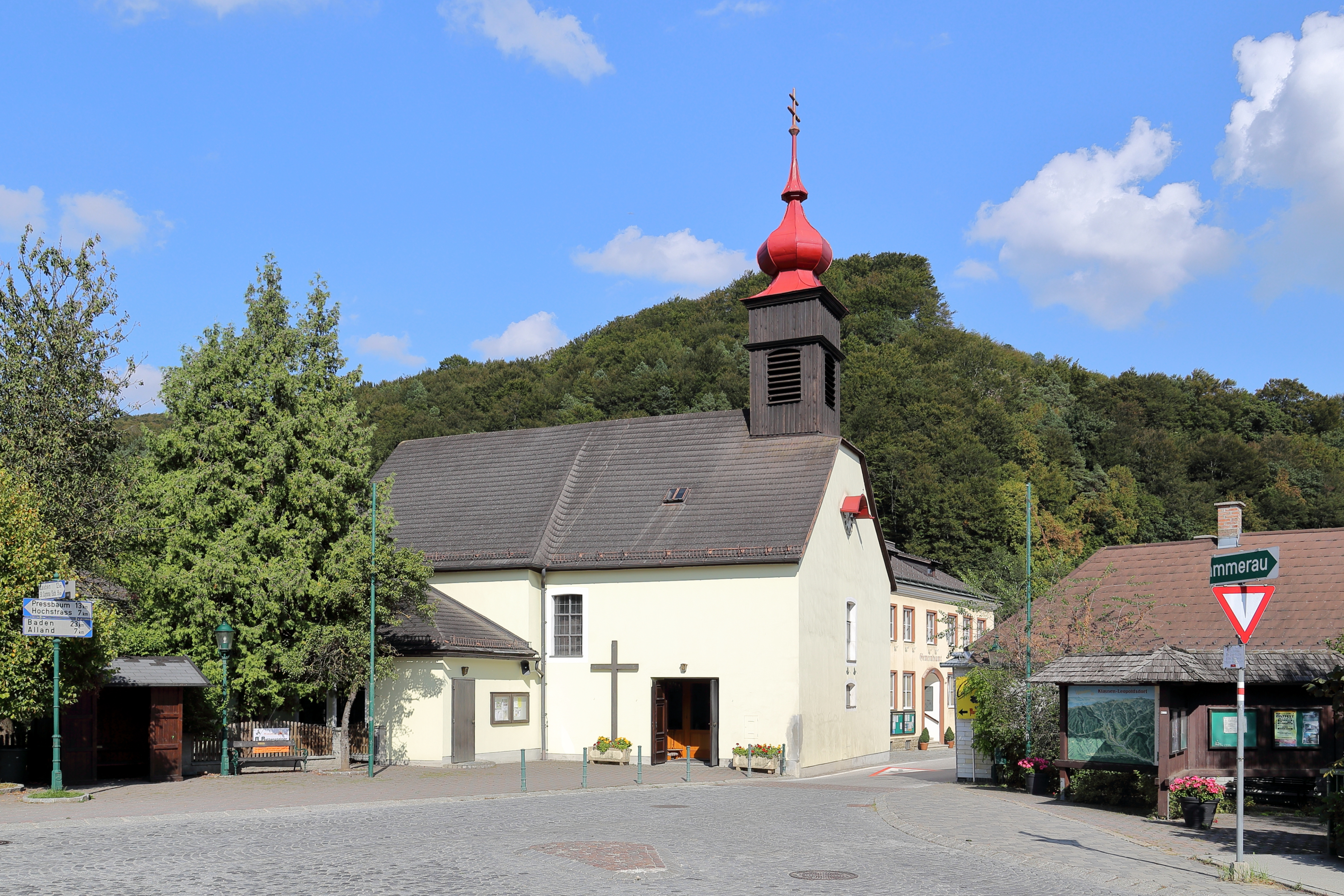 Westansicht der röm.-kath. Pfarrkirche hl. Leopold in der niederösterreichischen Gemeinde Klausen-Leopoldsdorf. Eine einfache Saalkirche mit Schopfwalmdach und Dachreiter. Sie entstand 1780 durch Umbau und wesentliche Erweiterung einer steinernen Kapelle, die in den 1750er Jahren errichtet wurde. Der Dachreiter mit Zwiebelhelm stammt aus dem Jahr 1840.